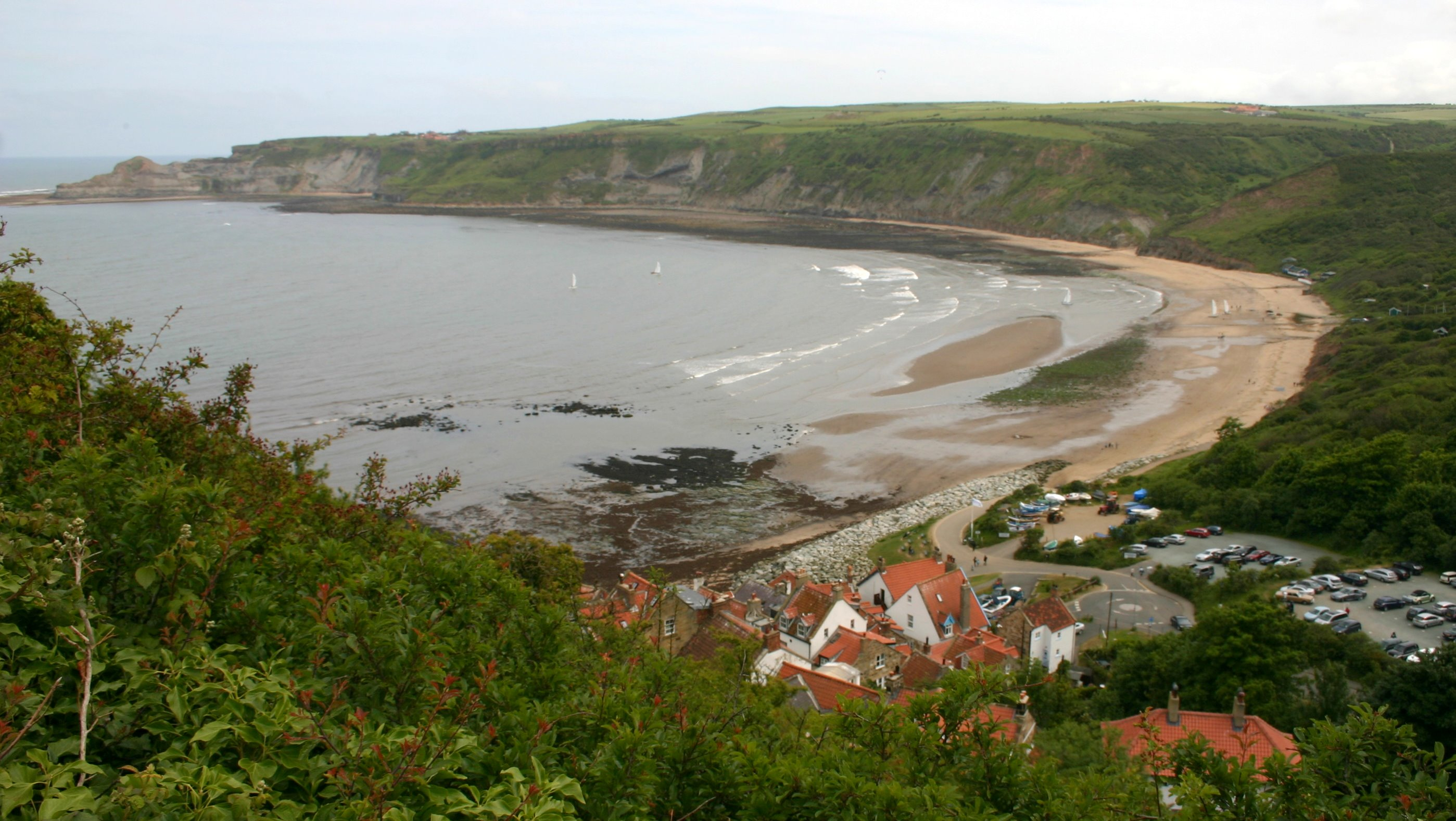 Runswick Bay